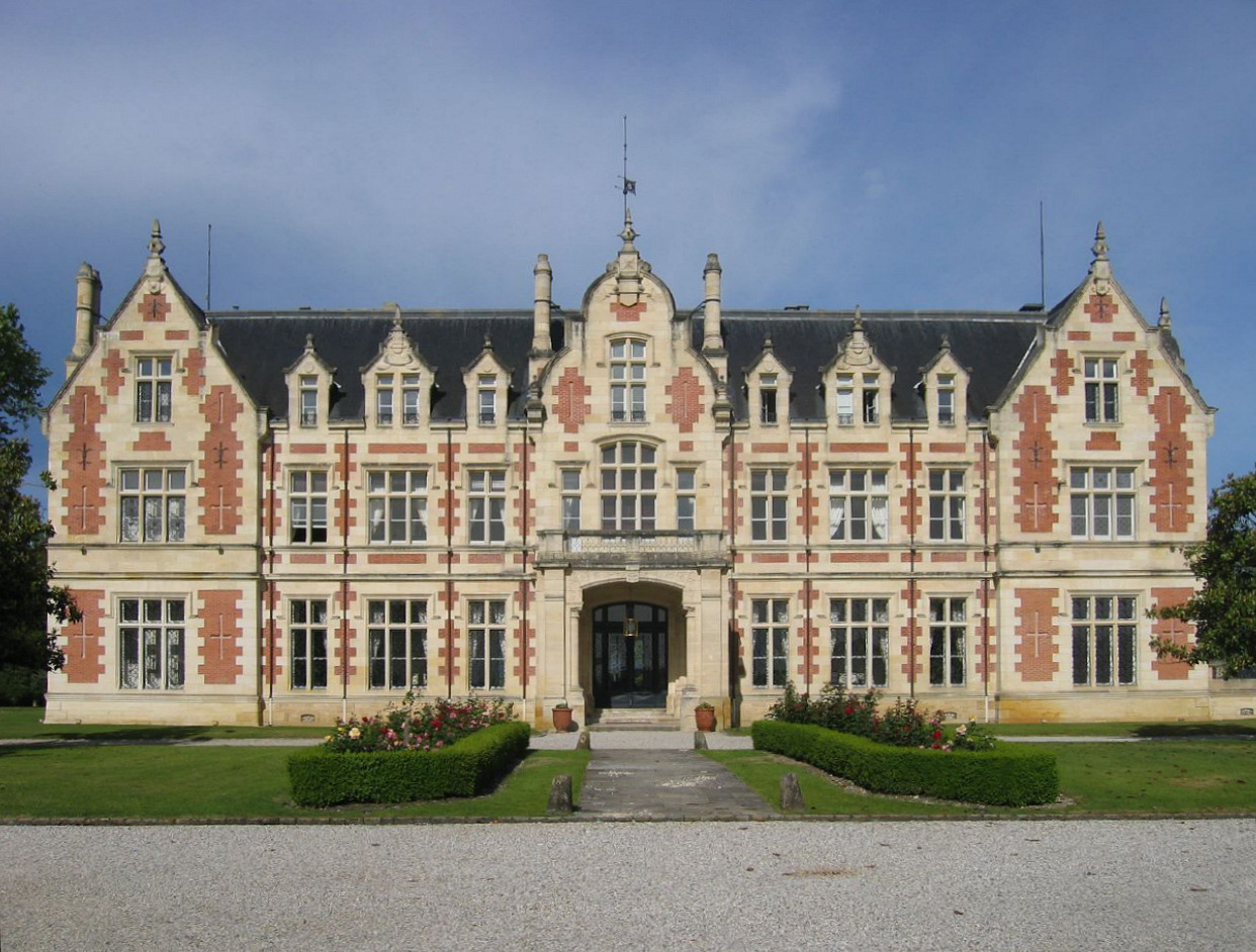 Le château Cantenac-Brown à Catenac, Gironde, France.